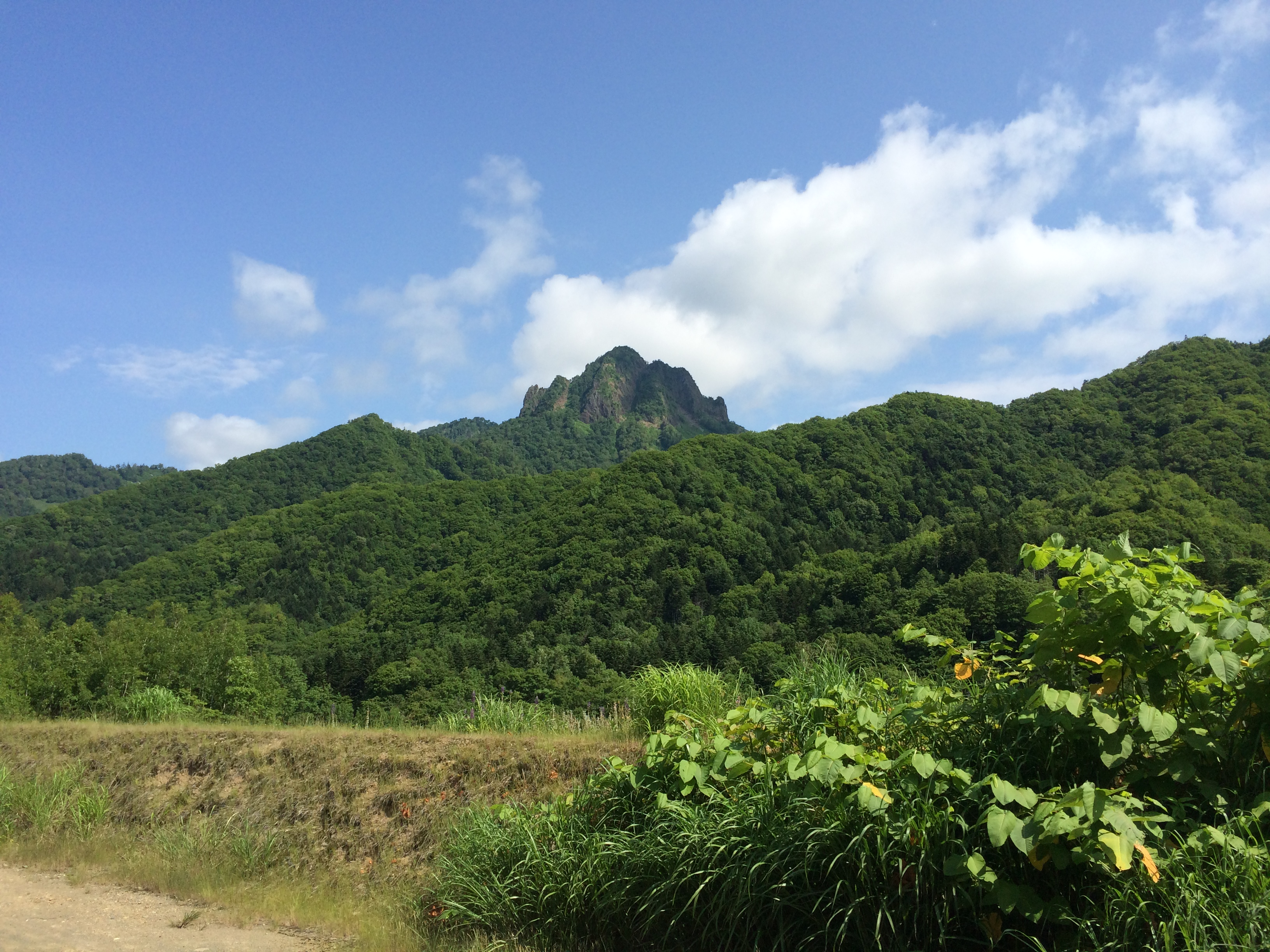 定山渓天狗岳２０１４年７月１日